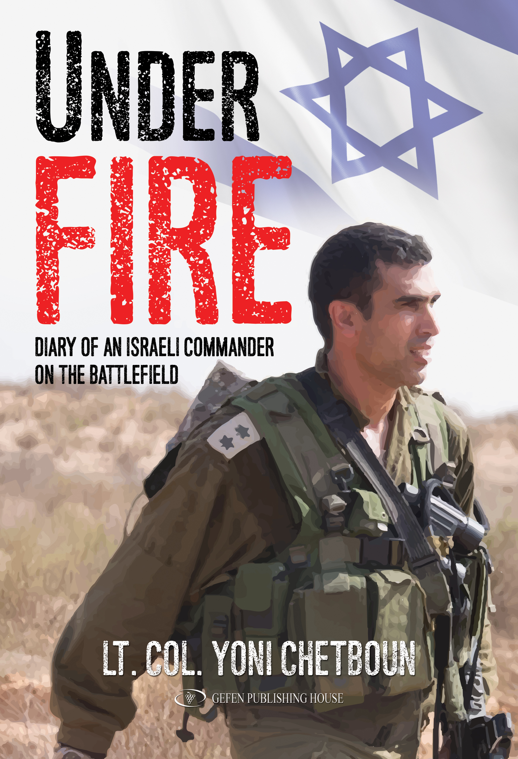 כריכת הספר "תחת אש" באנגלית